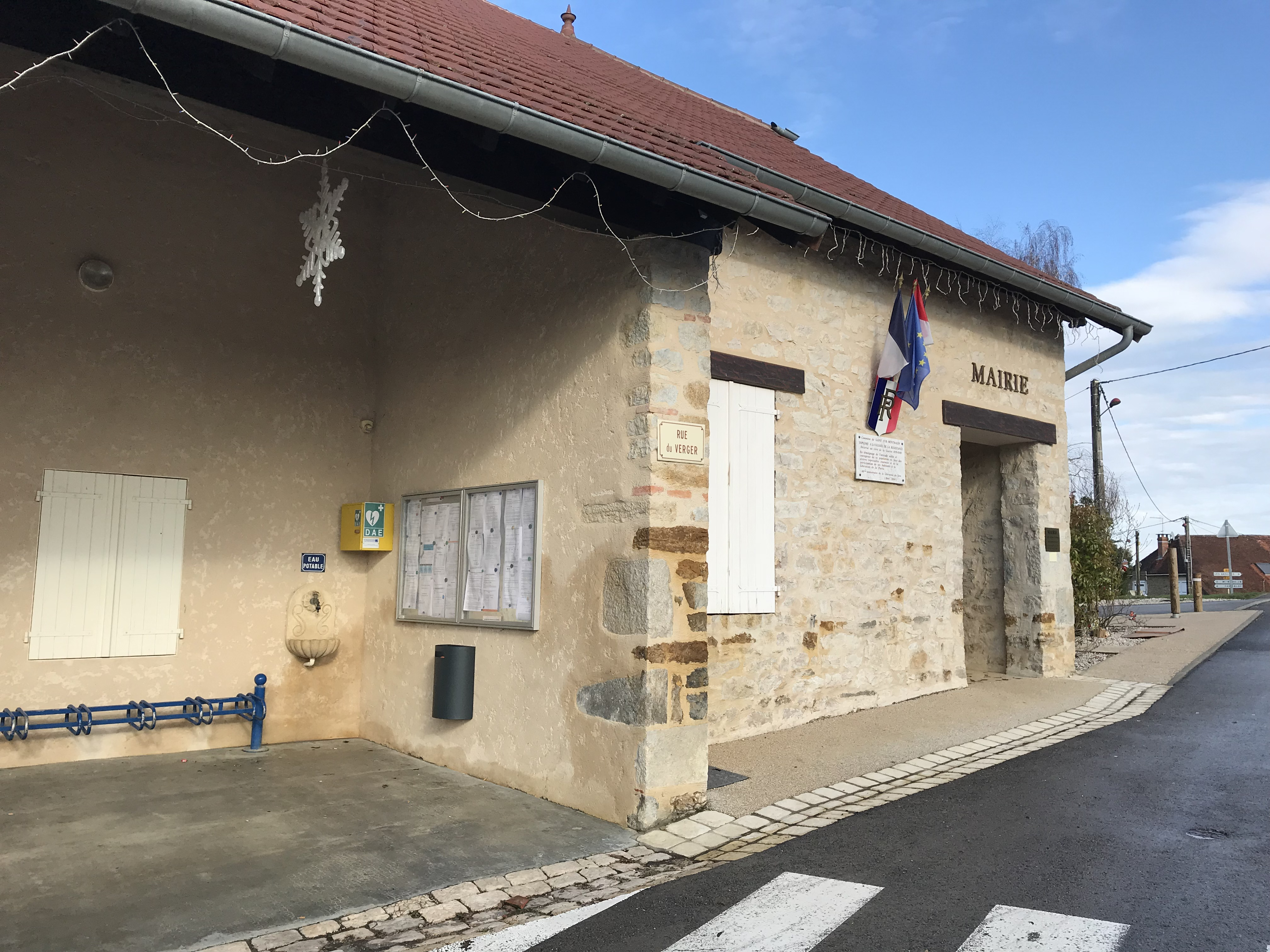 Image de Saint-Cyr-Montmalin (Jura, France) en janvier 2018.